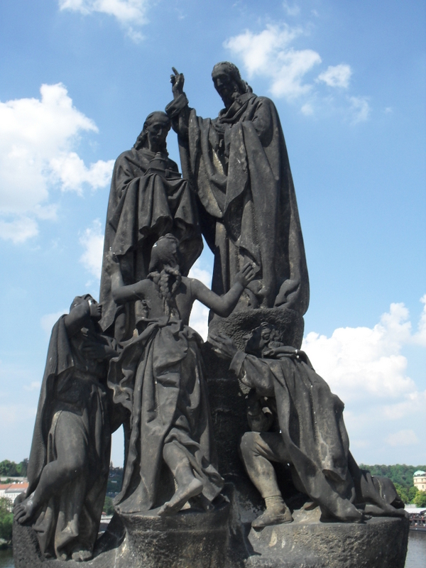 Karlův most, Staré Město a Malá Strana, mezi Křižovnickým náměstím a Mosteckou